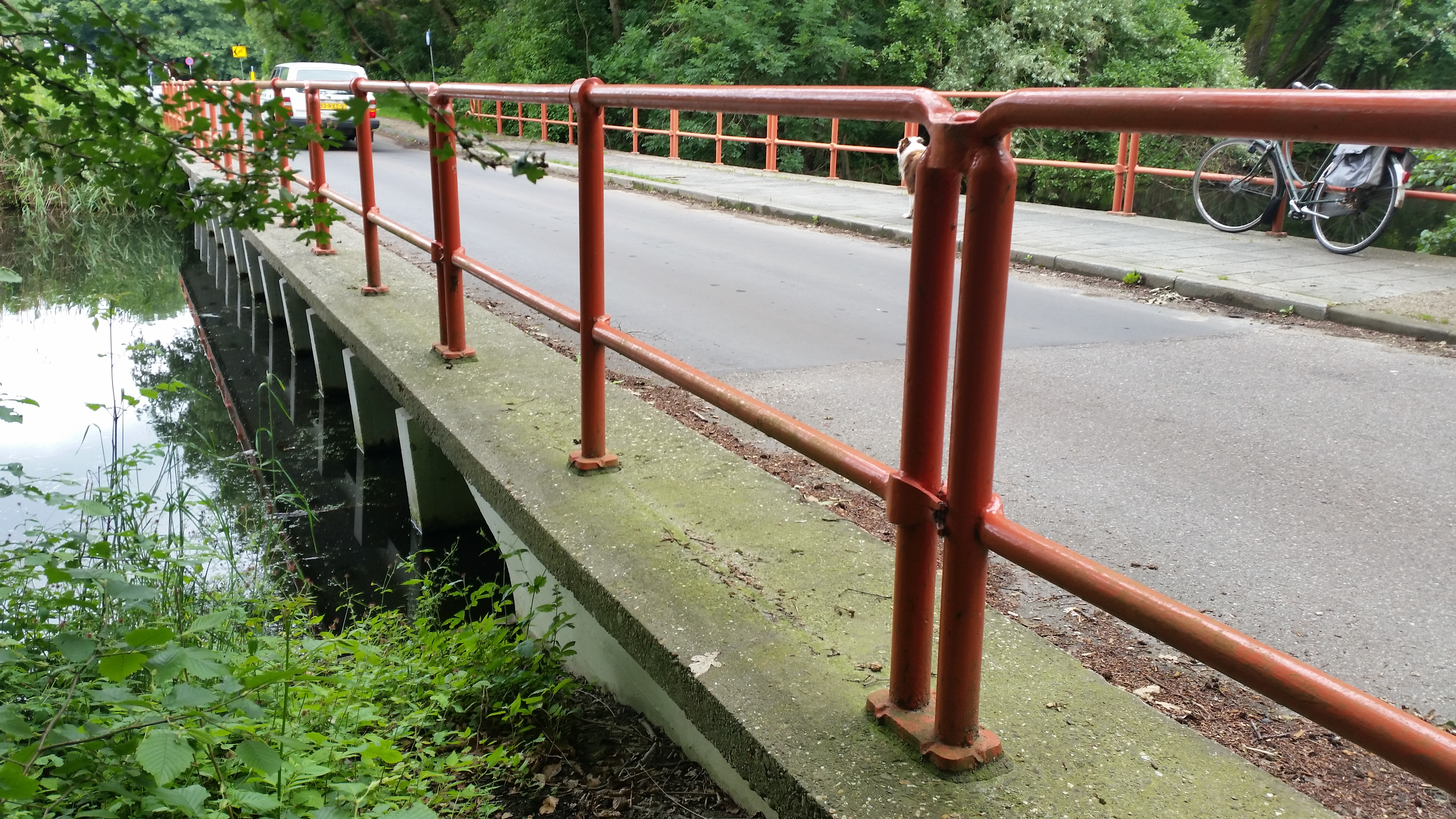 Zijaanzicht van Brug 554 (in Amsterdam)